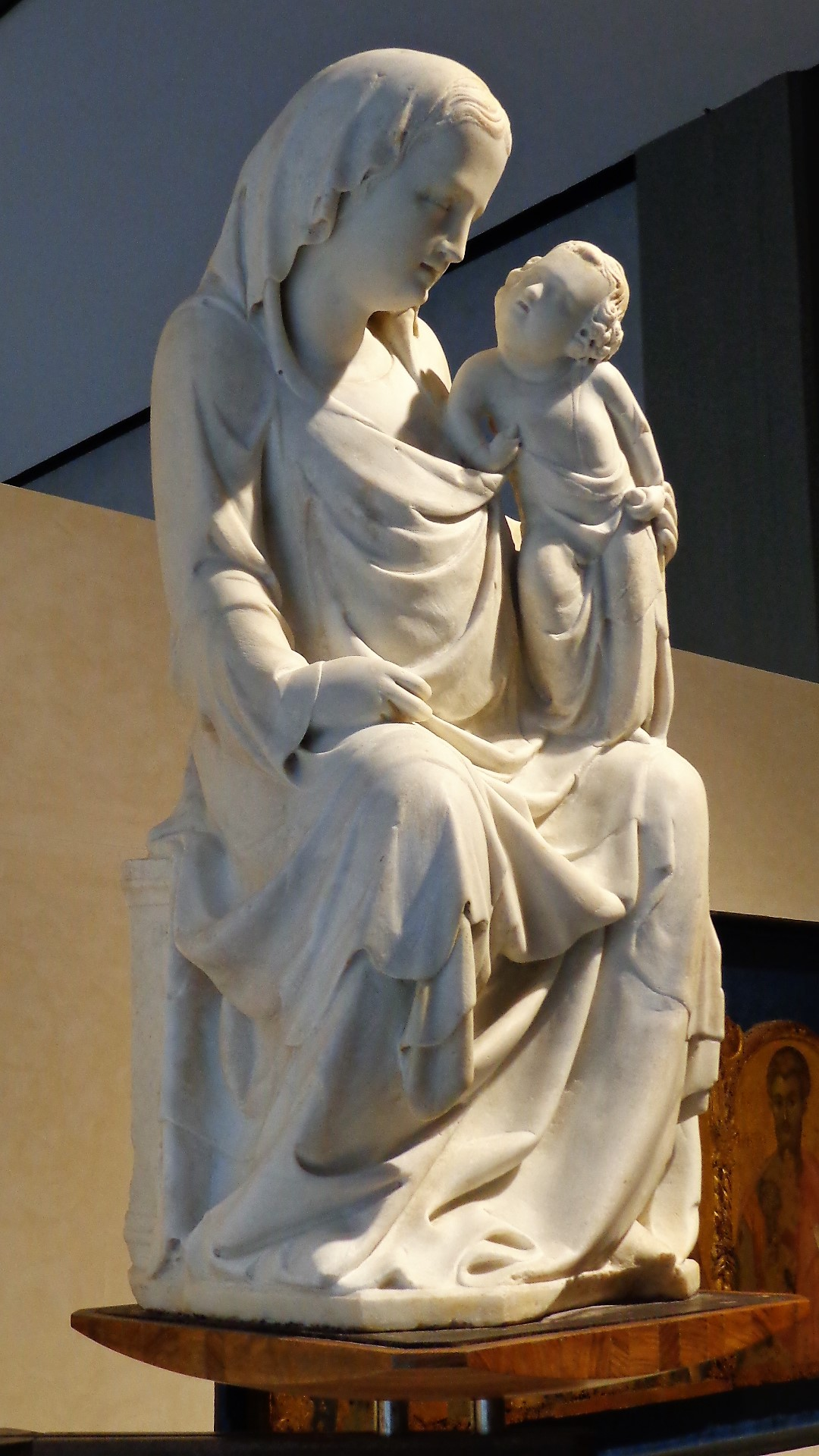 Madonna con bambino